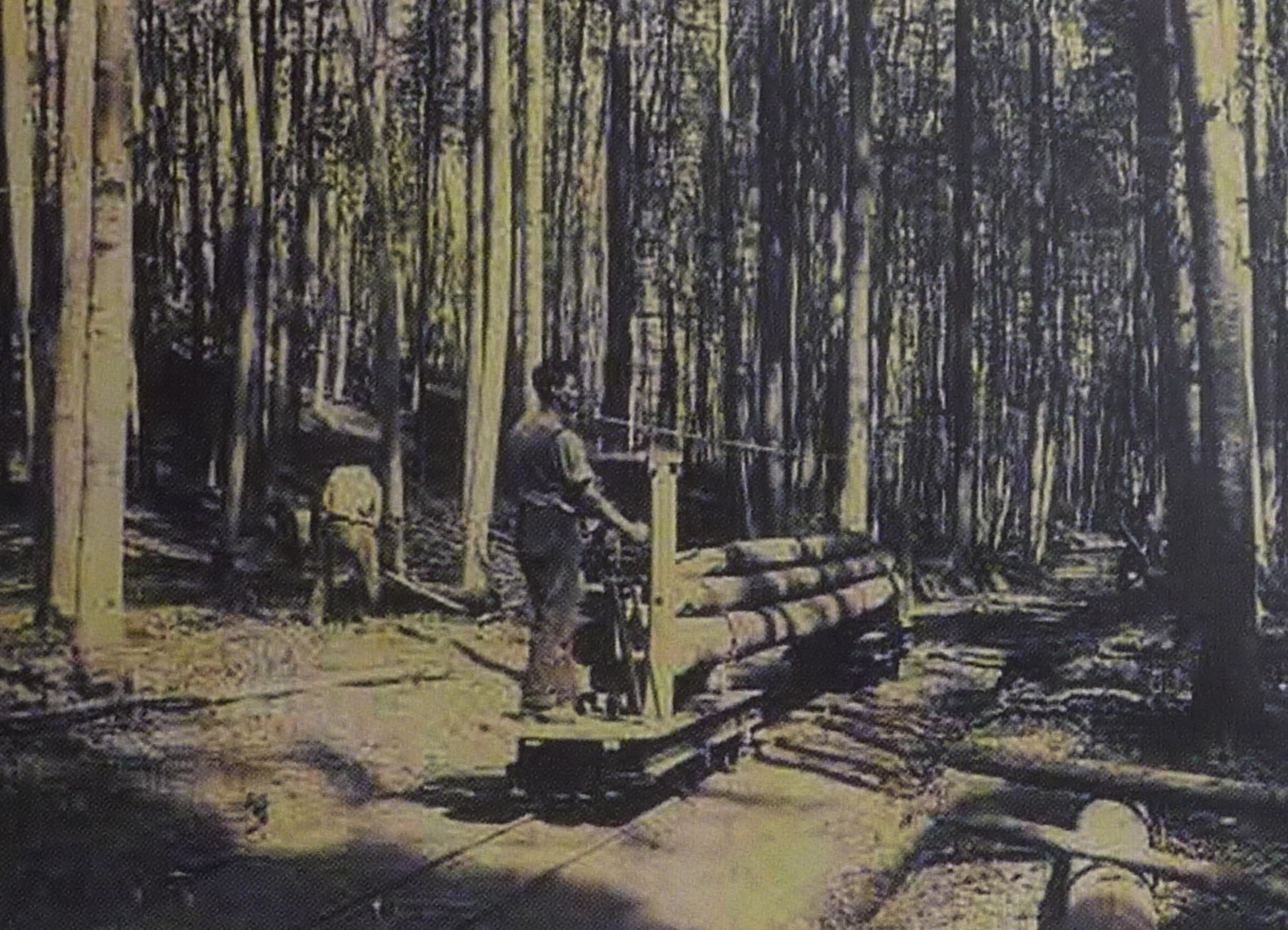 Sihlwald, Schweiz: Waldeisenbahn ab 1876